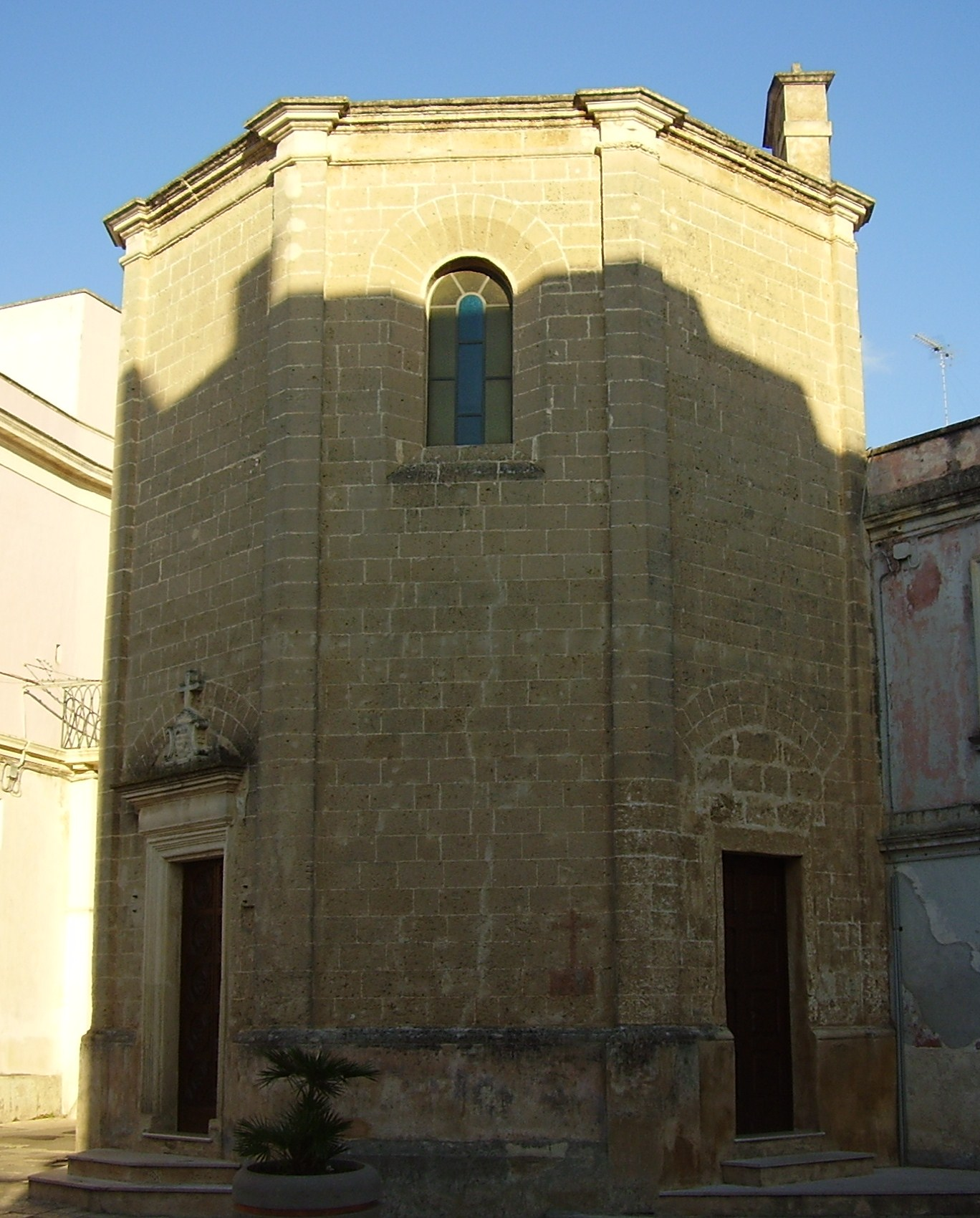 Chiesa Sant'Oronzo Novoli, Lecce